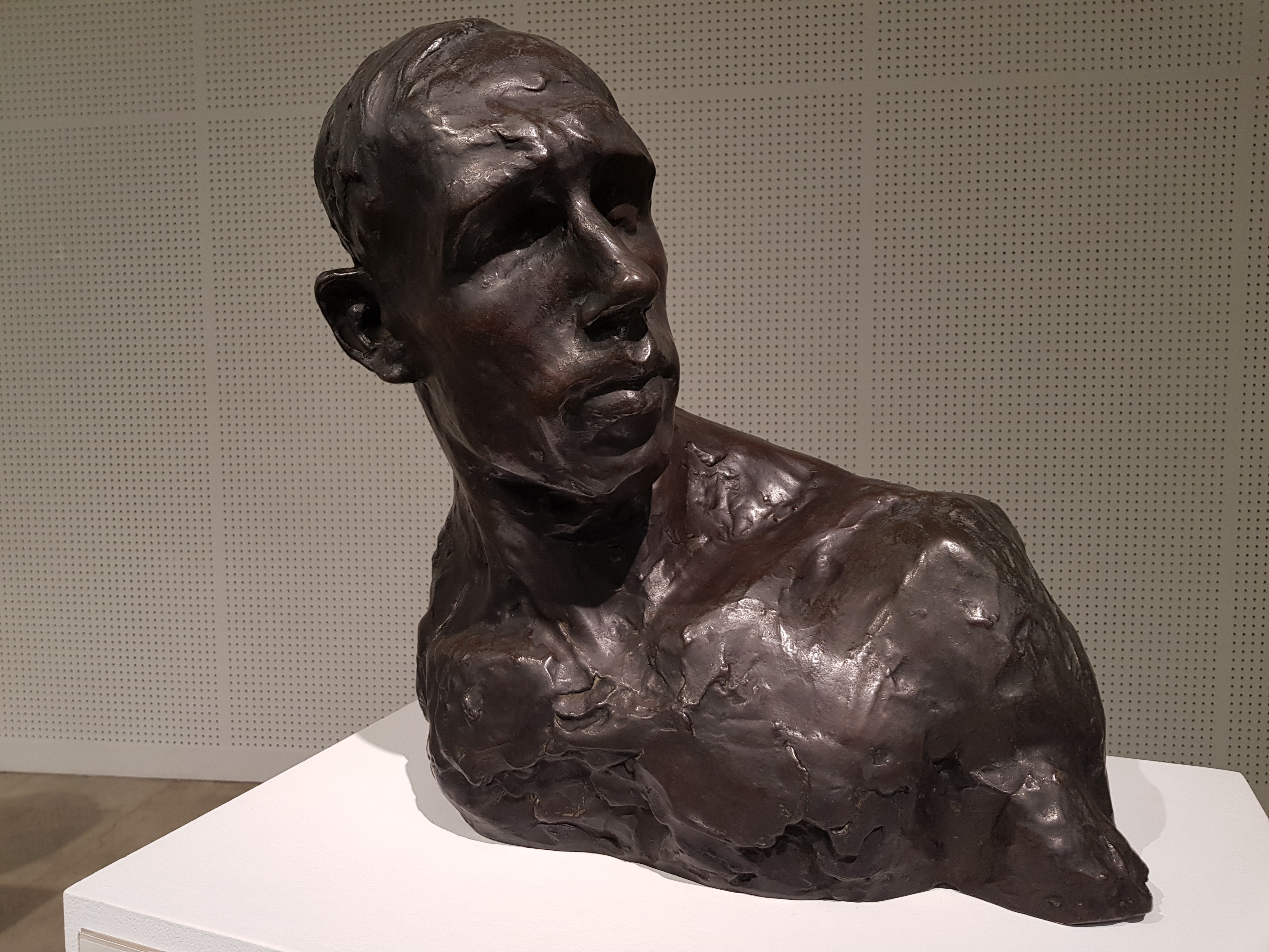 「坑夫」明治40年制作、明治42年第7回太平洋画会展出品作、箱根 彫刻の森美術館展示